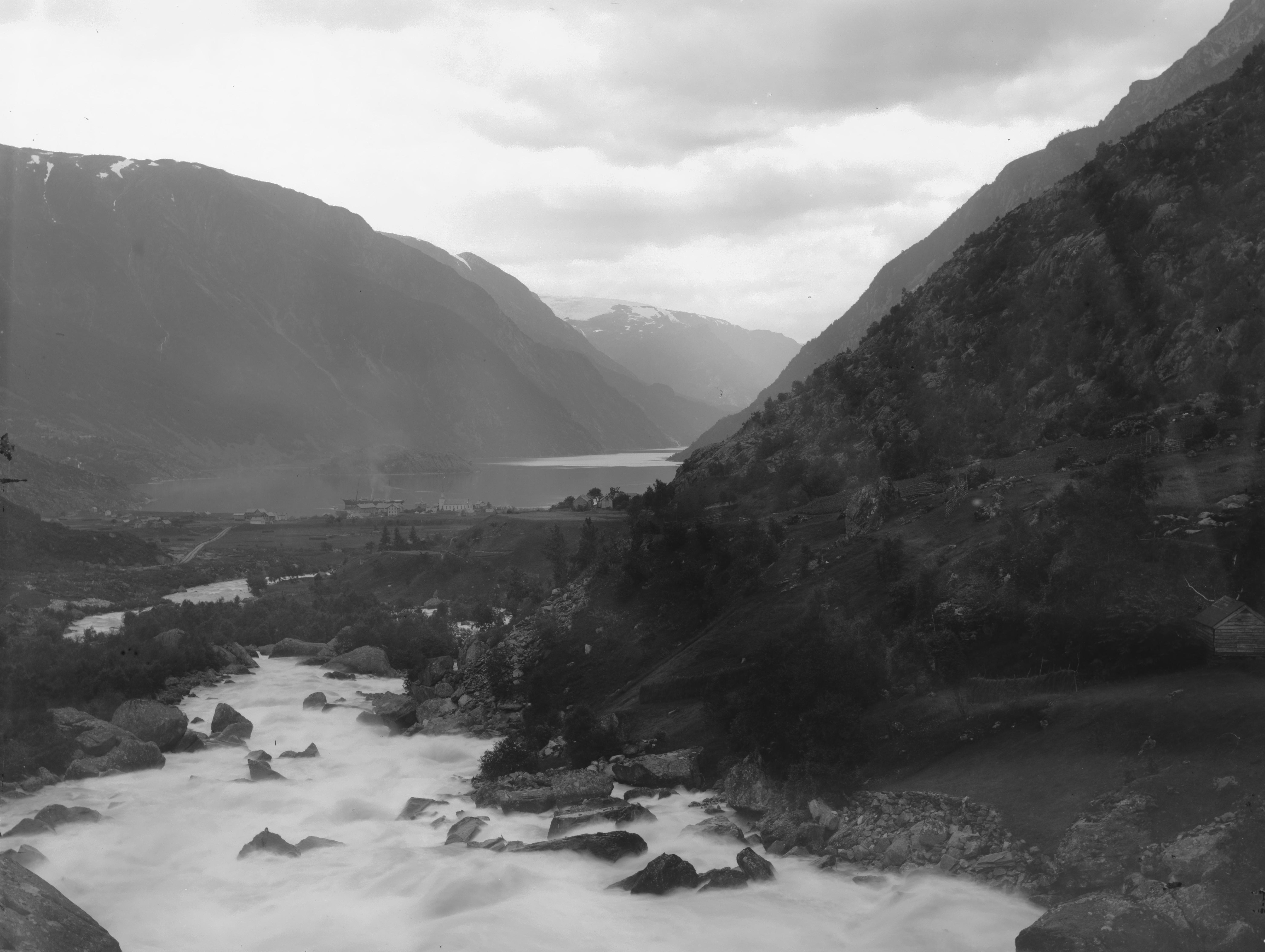 Bildet er hentet fra Nasjonalbibliotekets bildesamling. Anmerkninger til bildet var: Påskrift negativ: 446 Brødr. Brunskow, Christiania, Eneberettiget 1892 Påskrift konvolutt: B-276 Odda oversikt fra Vasstunbroen [Riksantikvaren] Odda, Odda, Hordaland